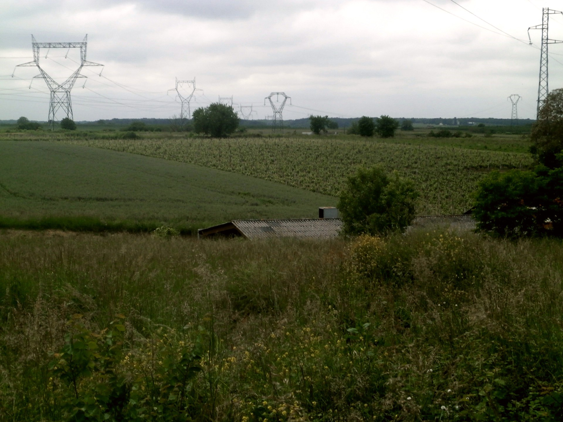 Vignes et champs de céréales sur le plateau de Candes-Saint-Martin